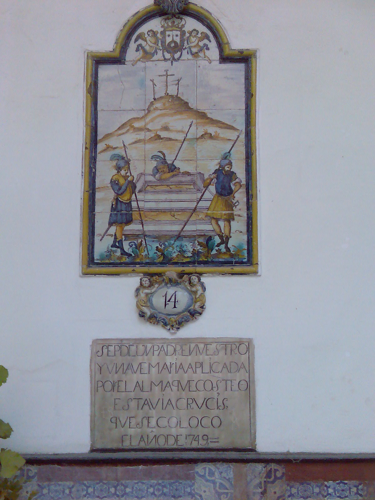 Via Crucis y placa en el Hospital de Mujeres (Obispado) Cádiz España